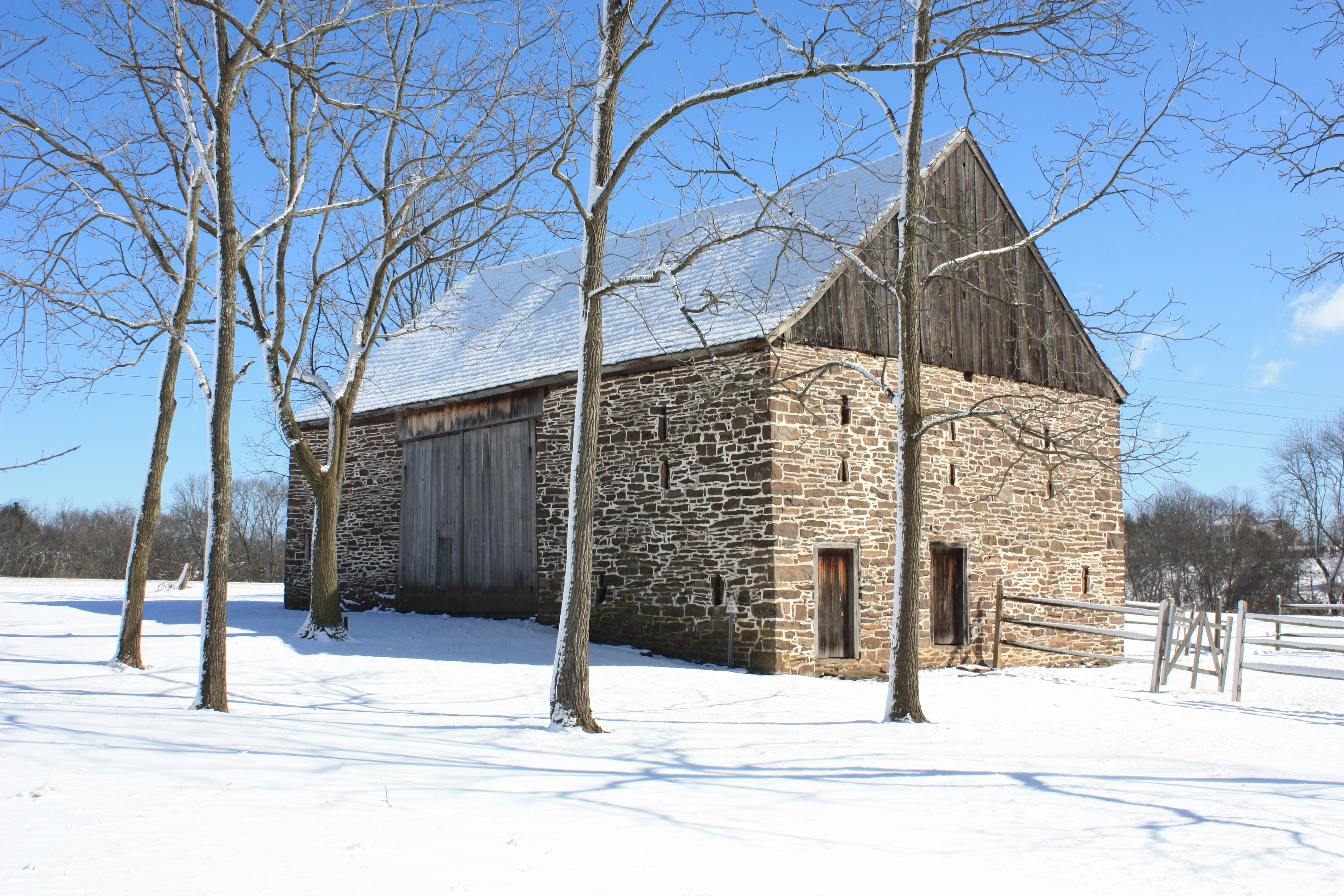 Barn at Heckler Farmstead heckler plains lower salford harleysville